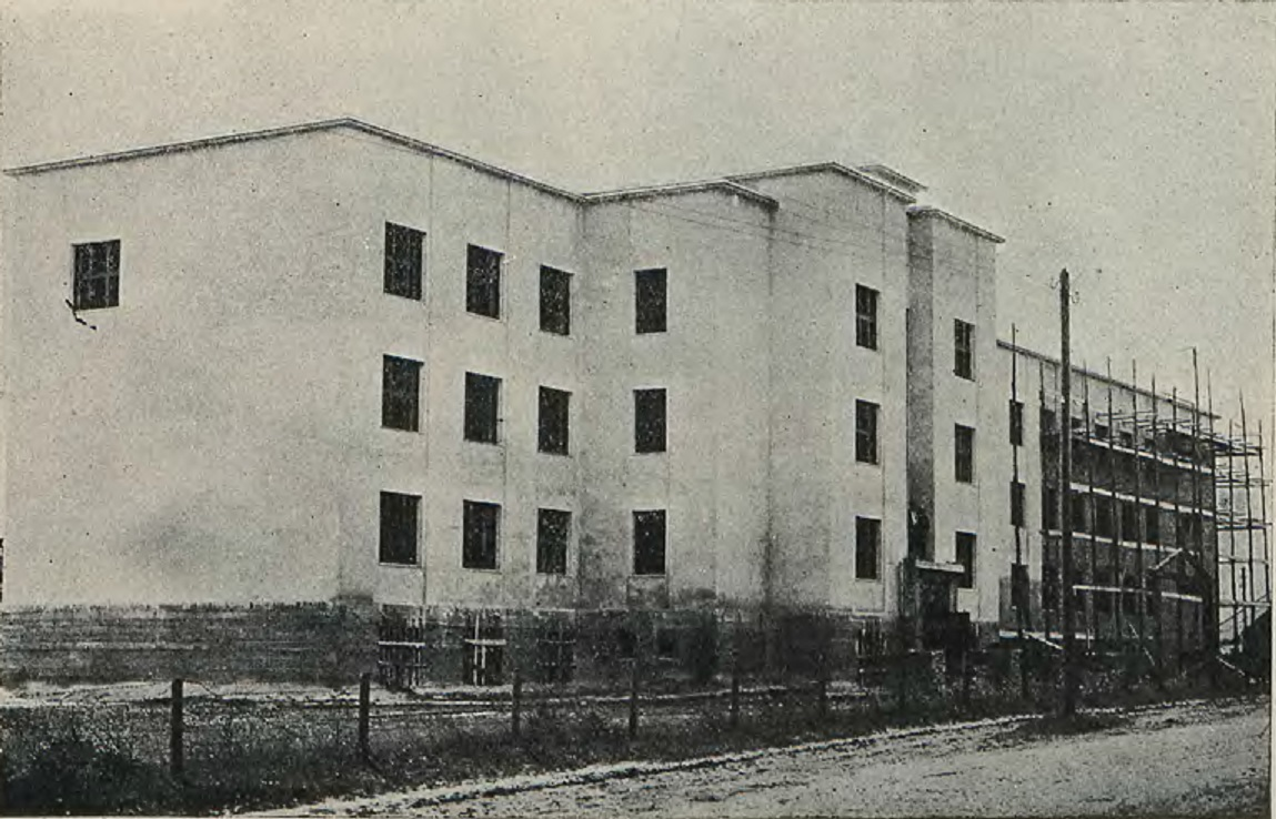 Казармы 8 батальёна Корпуса аховы памежжа ў Стоўбцах